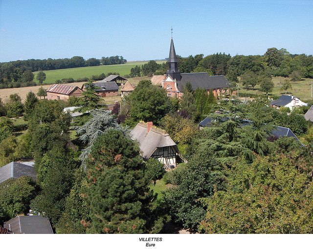 Villettes